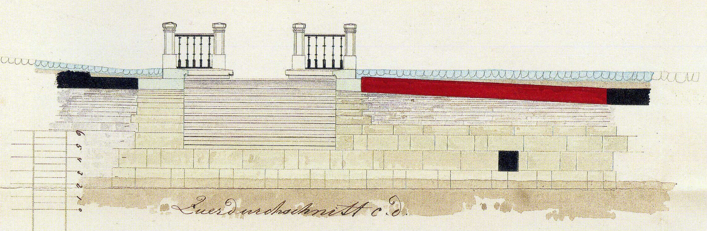 nákres nového sestupu k Nečízu na náměstí Přemysla Otakara v Litovli This file was uploaded during the project of WikiTown Litovel.